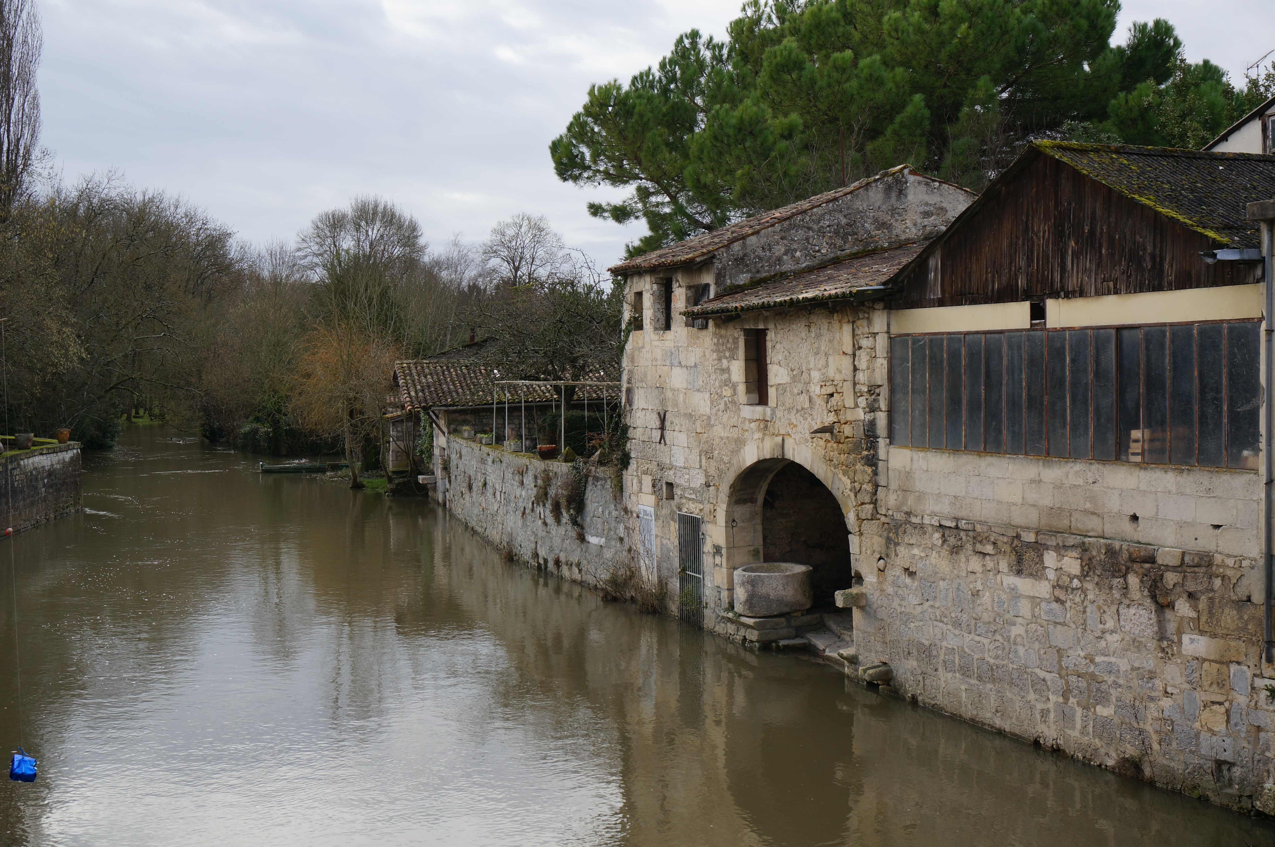 à Pons, sur la Seugne une ancienne tannerie. Vue depuis la rue de Gaule